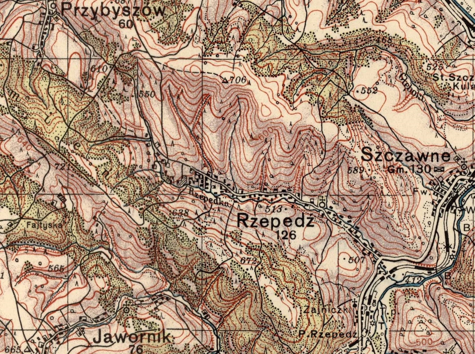 Wieś na mapie Wojskowego Instytutu Geograficznego w skali 1:100 000 z 1938 roku